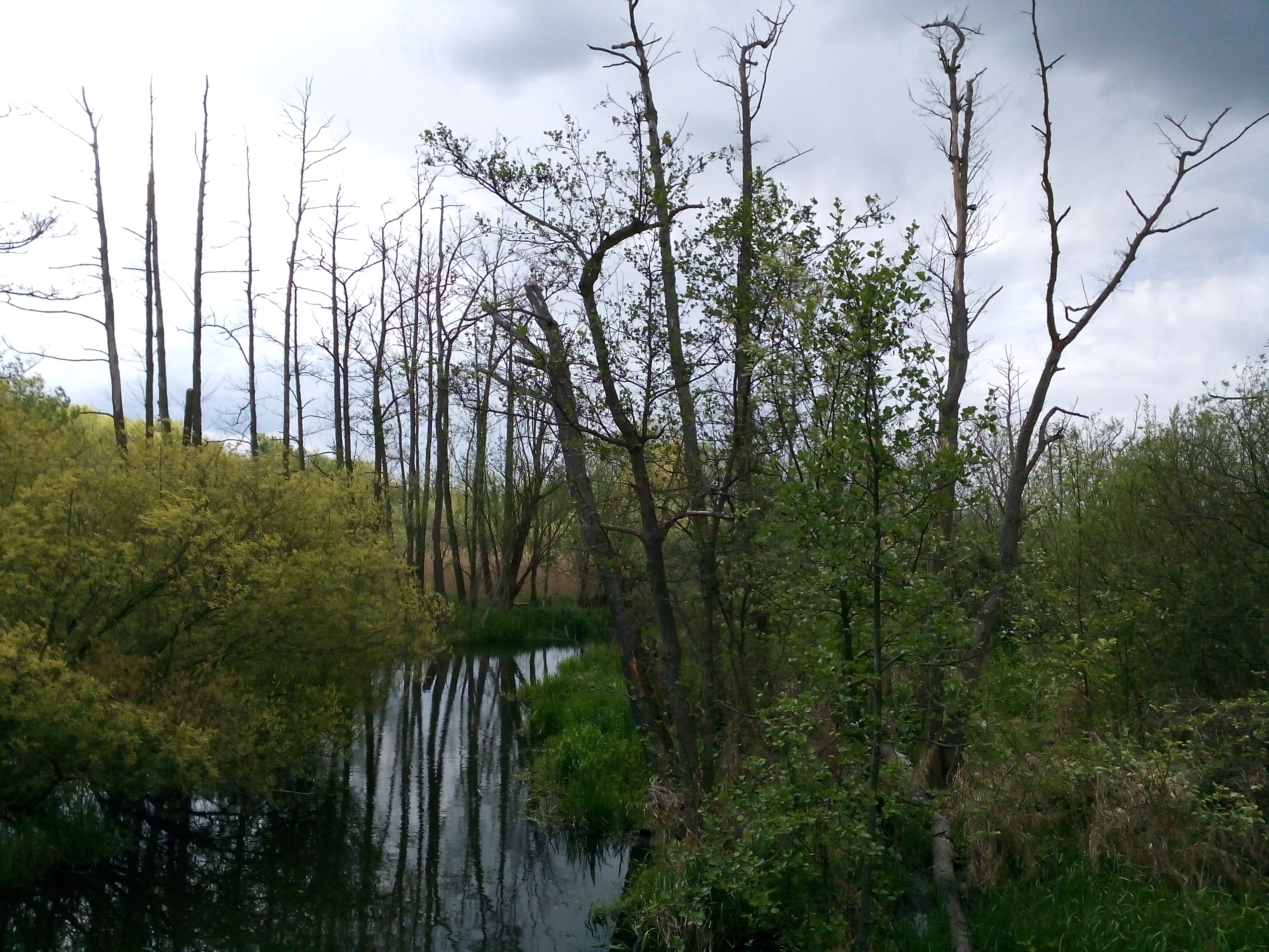 Aussicht vom Eichwerder Steg zwischen Hermsdorf und Lübars in Berlin auf's Tegeler Fließ, FFH-Gebiet „Tegeler Fließtal“